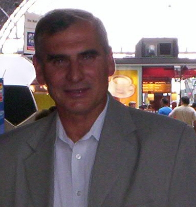 Paweł Janas i Michał Listkiewicz na dworcu kolejowym we Frankfurcie nad Menem